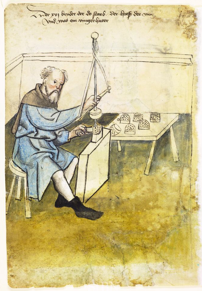 ving[...] (Fingerhuter) N.N. , vingerhuter (Fingerhuter; Fingerhutmacher) Transkription und weitere Informationen